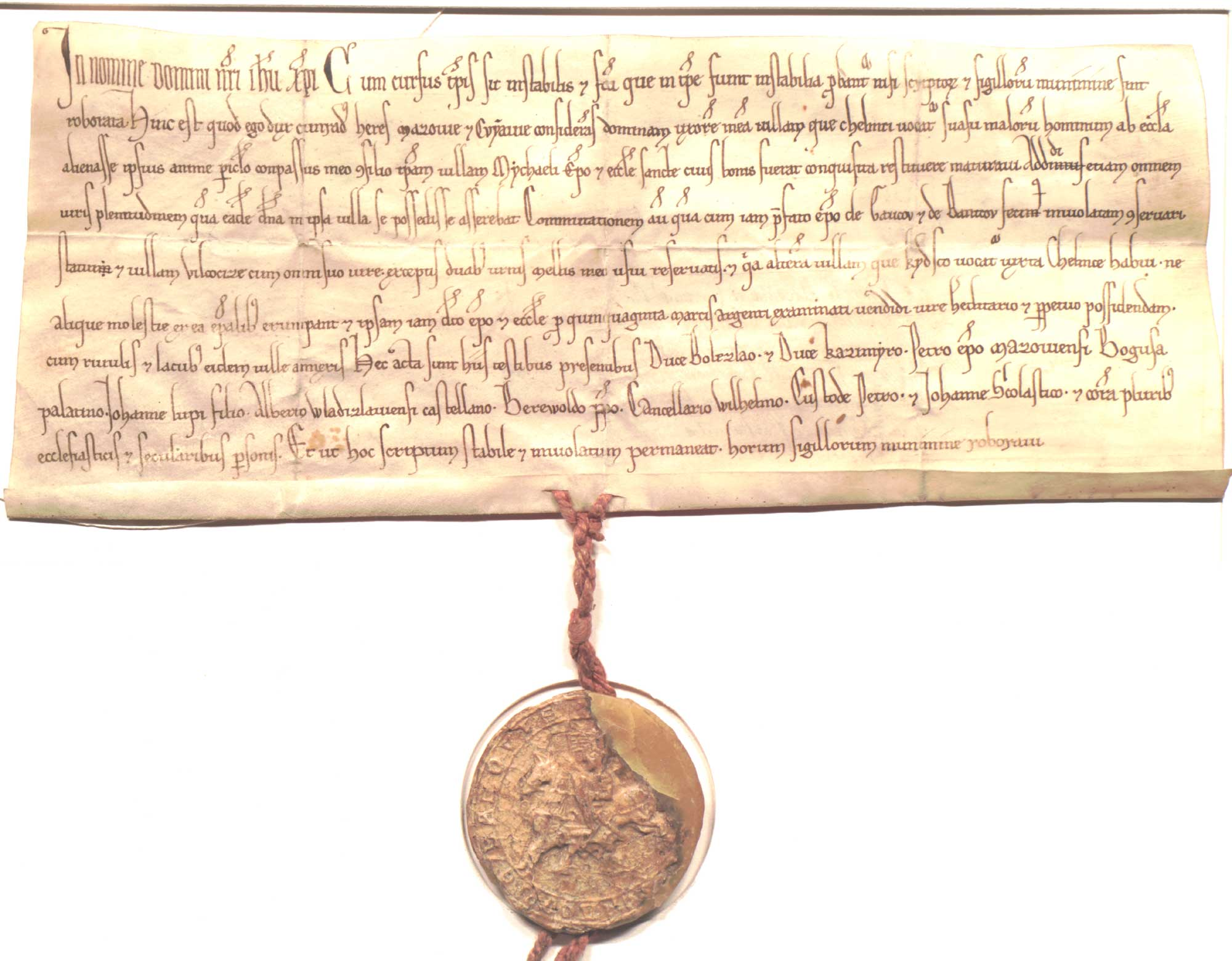 Konrad, ks. mazowiecki i kujawski, zwraca Michałowi, bpowi kujawskiemu, wieś Chełmce, sprzedaje mu wieś Kicko i zamienia wieś Bątkowo. Język: łac. Opis zewnętrzny: oryg., 1 k. pergaminowa, 33,6 x 13,5 + 1,1 cm; pieczęć na sznurze